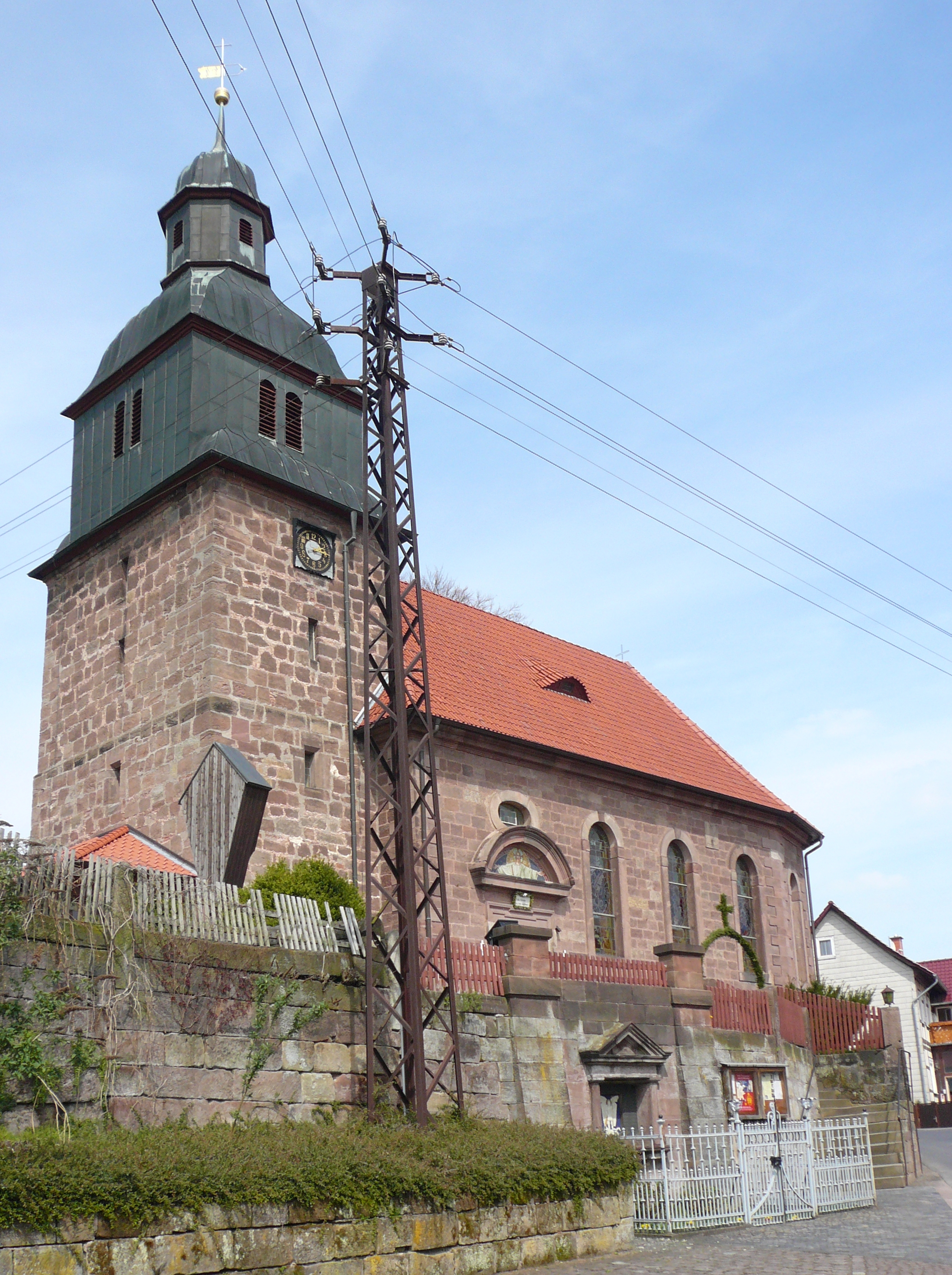 Katholische Kirche St. Petrus und Paulus, Rustenfelde